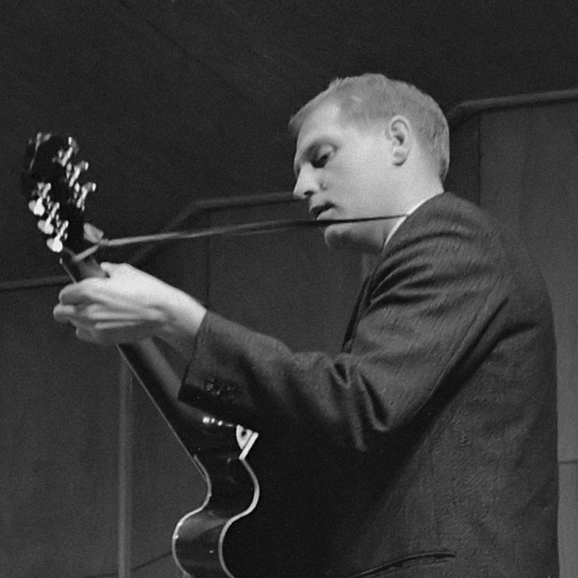 Jazz-concert AMVJ gebouw te Rotterdam 10 januari 1960